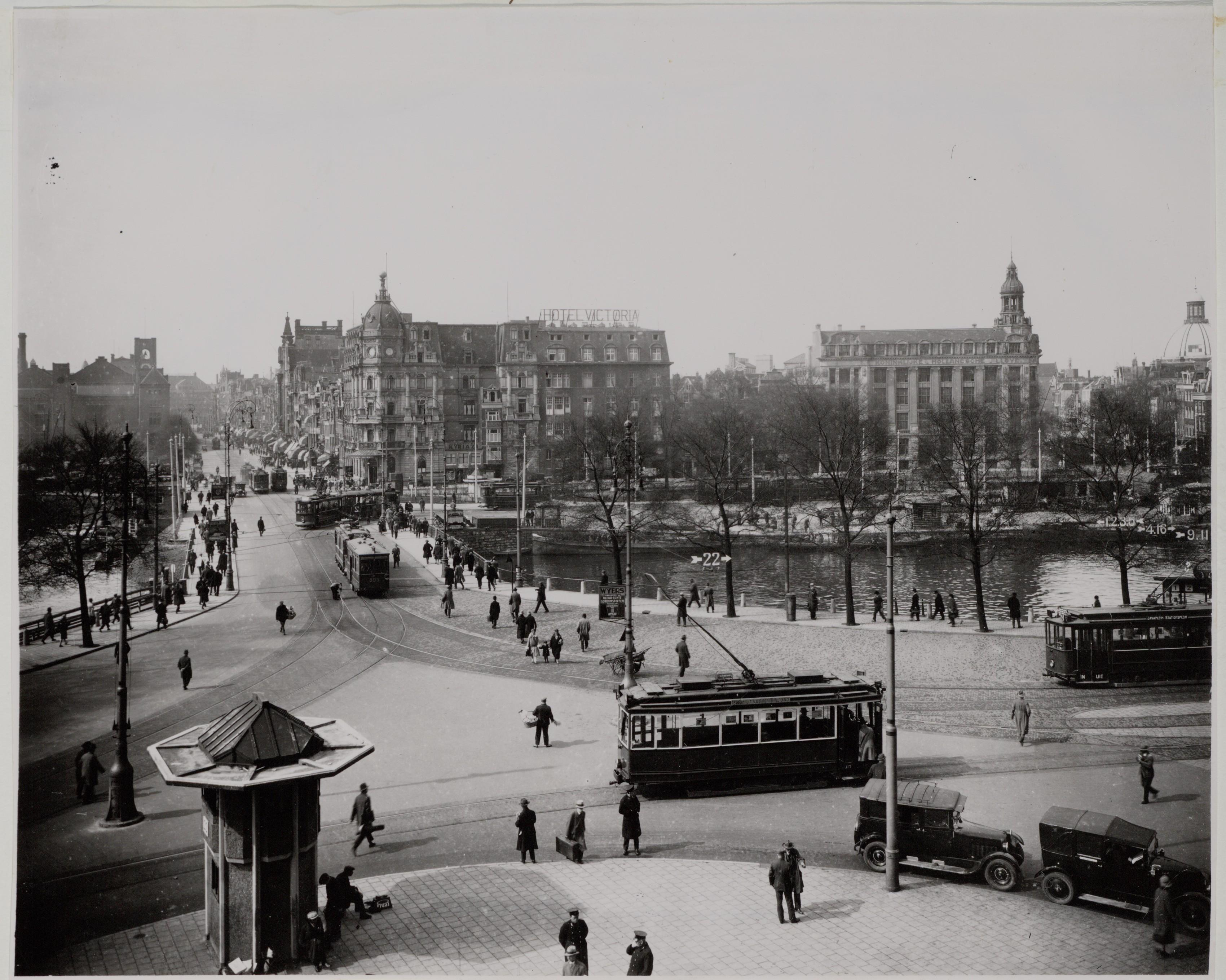 Stationsplein, gezien vanaf het Centraal Station naar Links: Damrak 1-5 Hoek Prins Hendrikkade. Op de voorgrond: tramhalte met tram van lijn 22 (Kringlijn Centraal Station - De Ruijterkade met motorwagen serie 391-395) en geparkeerde auto's. Op de voorgrond een schoenpoetser met ERDAL reclame op zijn schoenpoetskist.